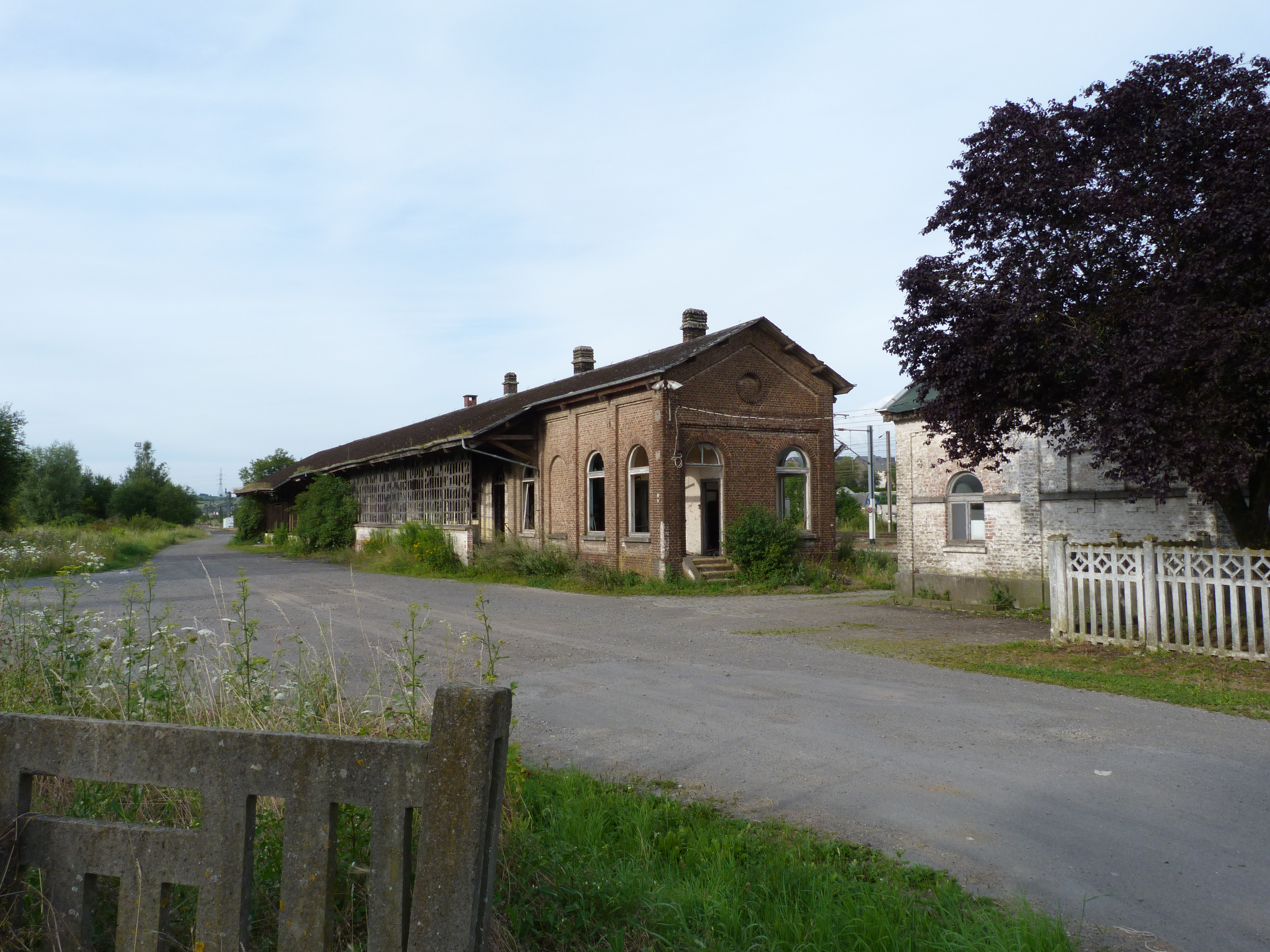 La gare cargo d'Athus désaffectée